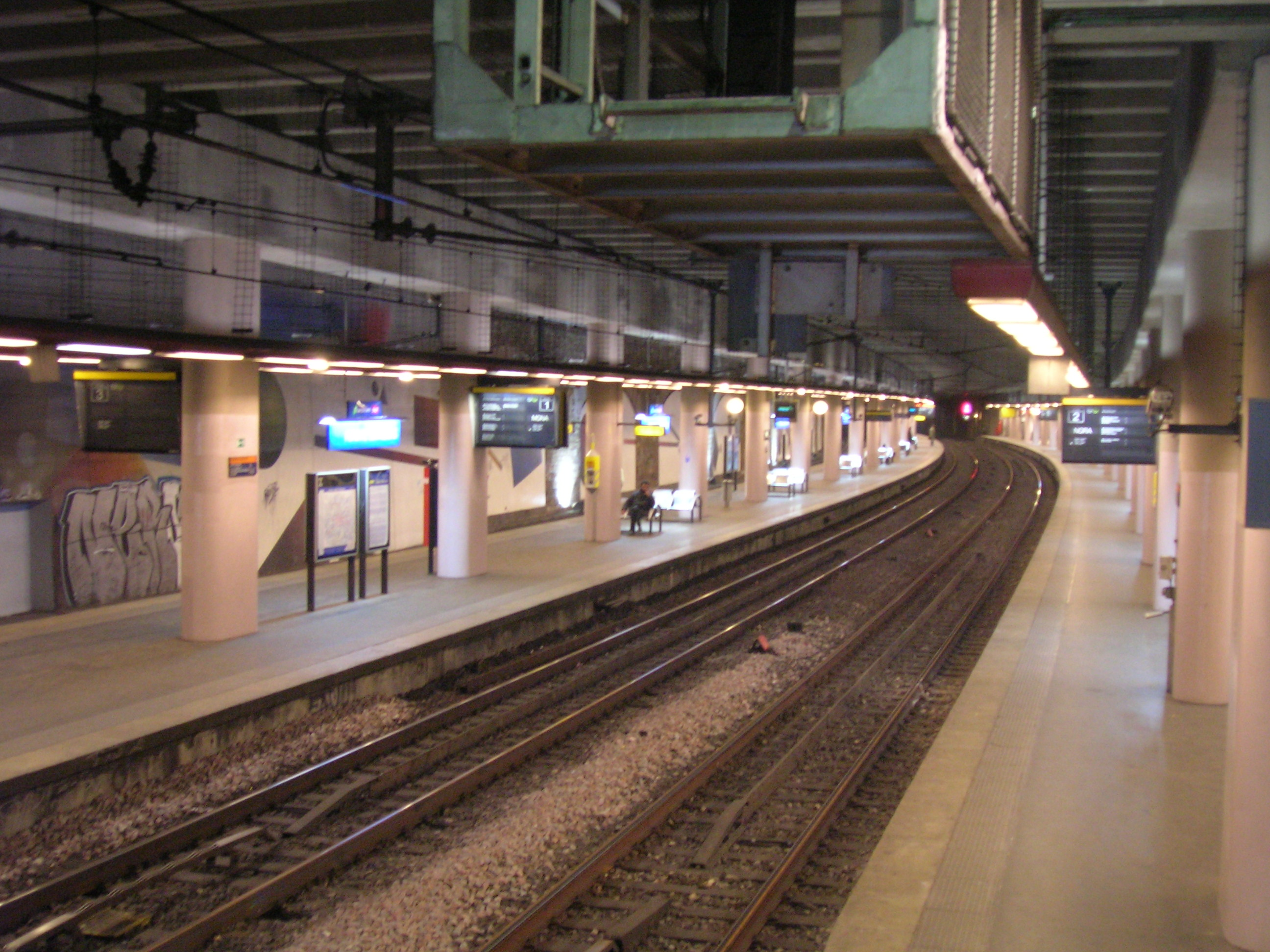 Station Pereire - Levallois du RER C, niveau quais, Paris 17e, France